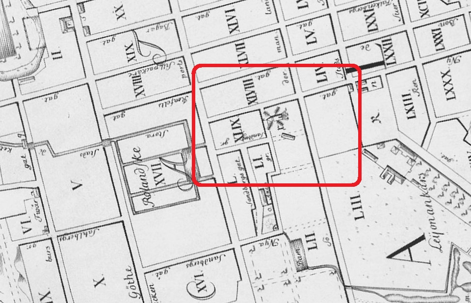 Del av karta över Stockholm visande Nytorgs kvarn